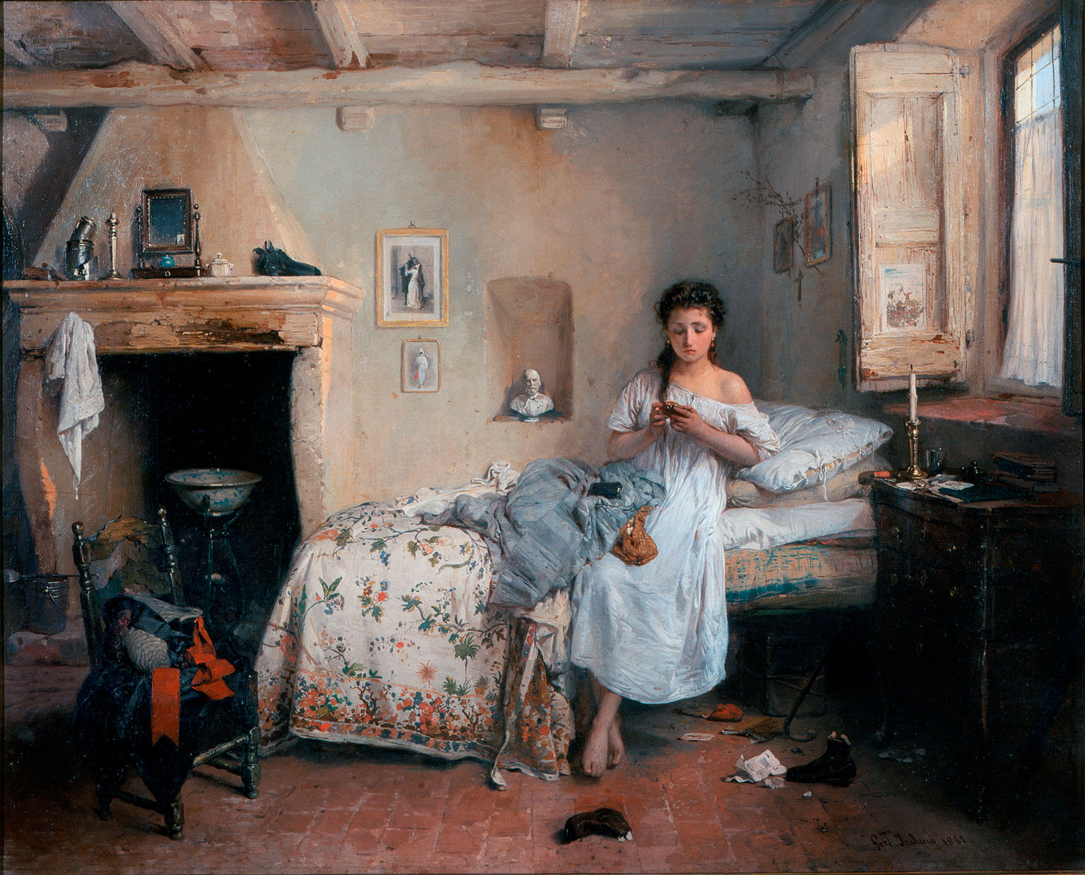 Gerolamo Induno Triste Presentimento,1862 olio su tela, cm 67 x 86 Pinacoteca di Brera, Milano